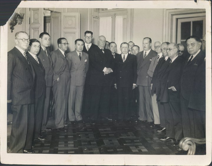 El gobernador de Tucumán, Miguel Campero, recibe al ex-presidente Marcelo T. de Alvear y su comitiva, durante la campaña electoral provincial de 1938.